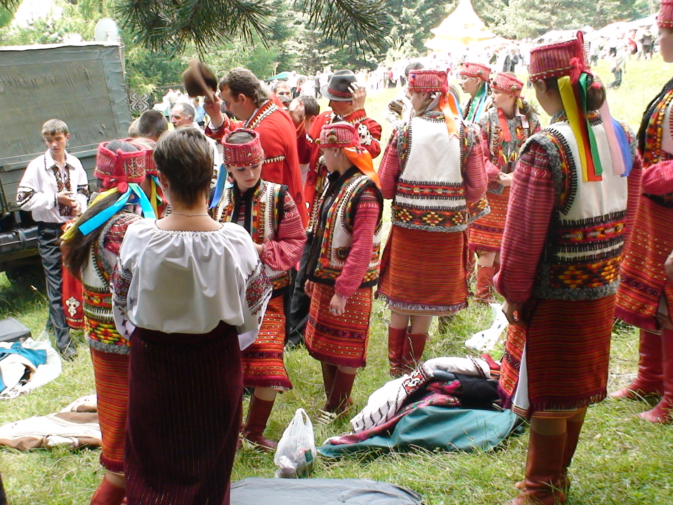 Участницы фольклорного празднества возле села Криворивня в традиционных гуцульских костюмах